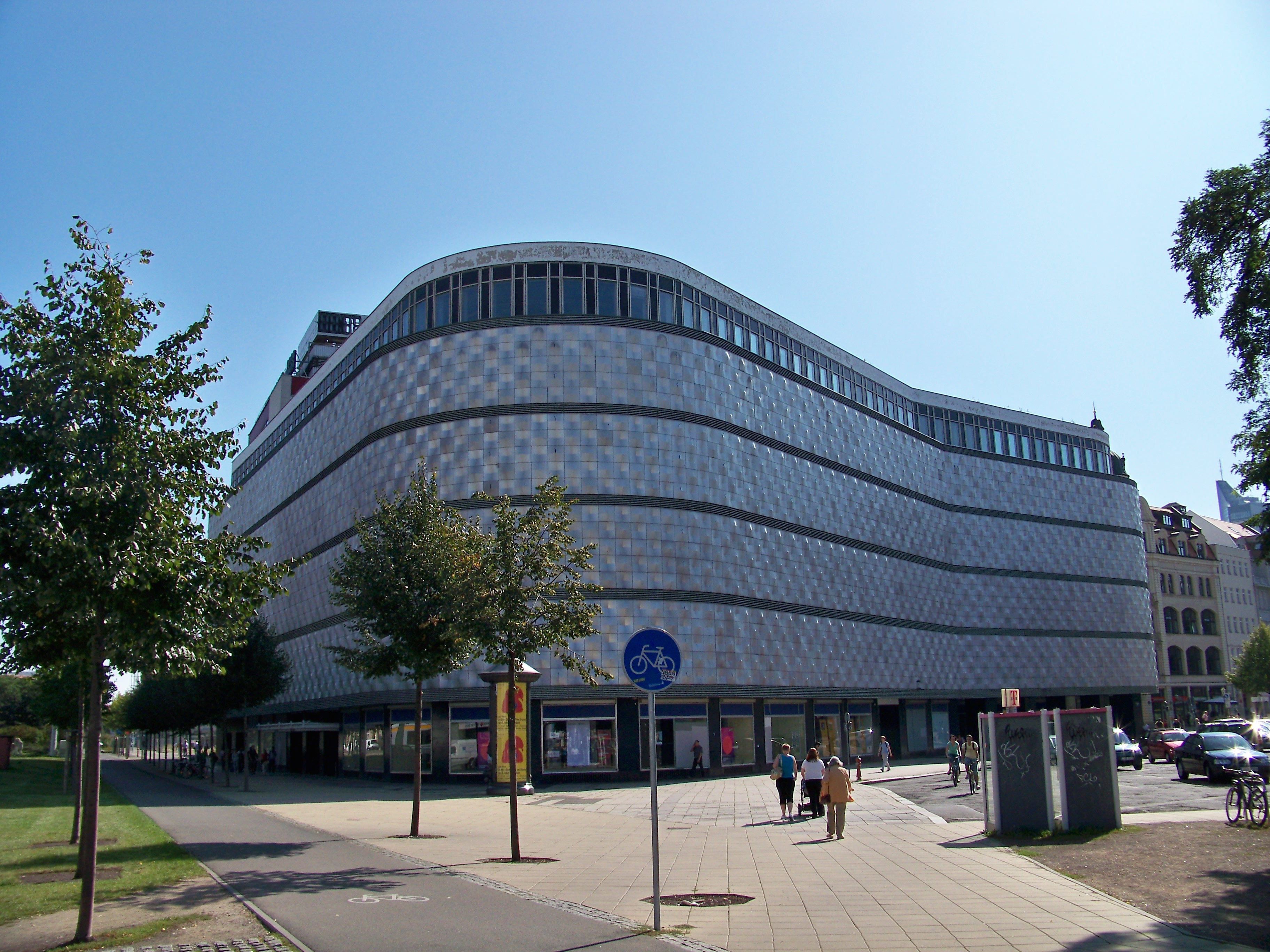 Höfe am Brühl in Leipzig (im Volksmund Blechbüchse)